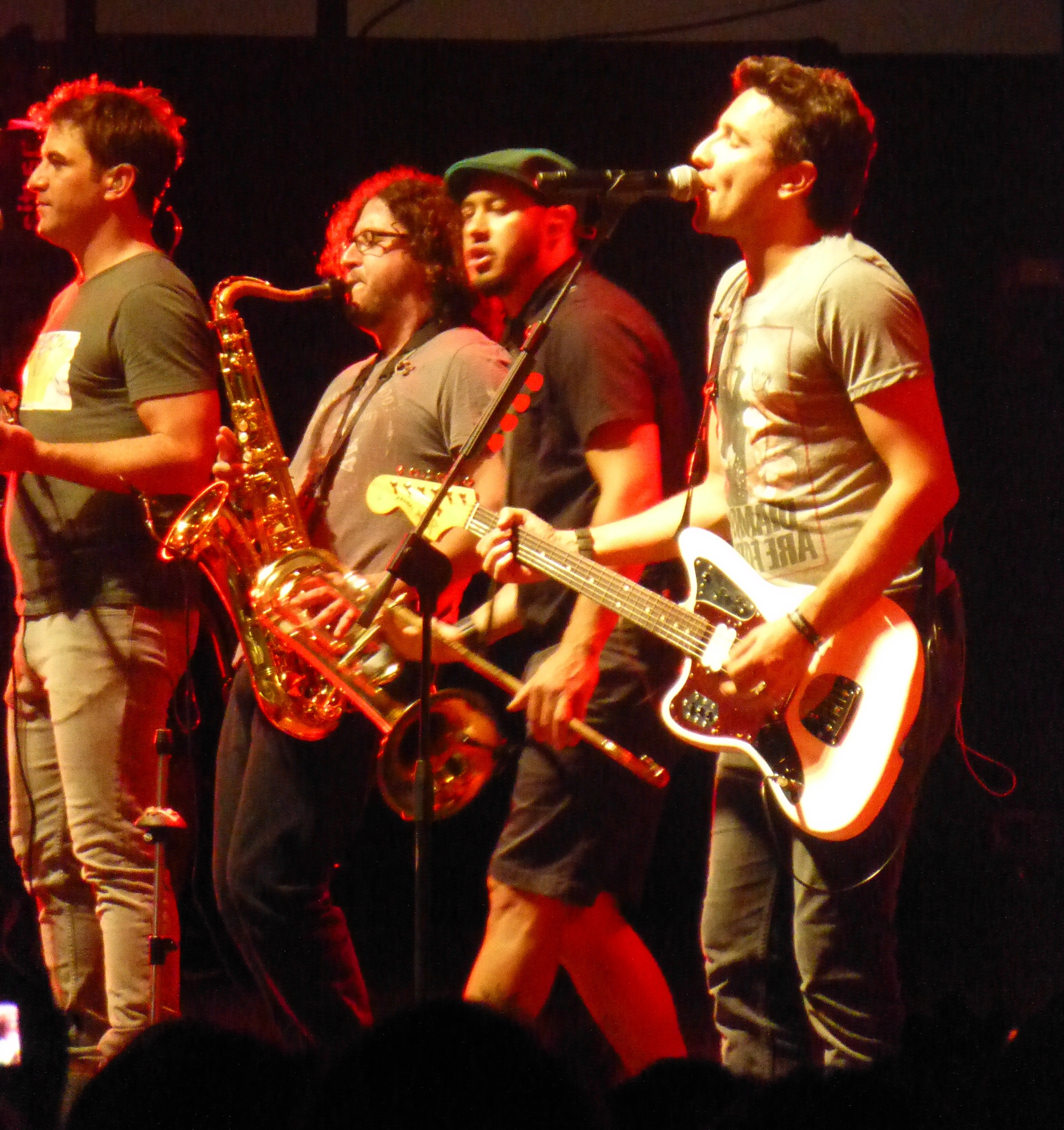 Concierto de No Te Va Gustar (NTVG) durante la XXXIV Fiesta Nacional del Inmigrante en la ciudad de Oberá, Misiones. Agradecimiento a la Federación de Colectividades por la gentileza de acreditar a Wikimedia Argentina como medio de prensa durante la realización de la Fiesta del Inmigrante.